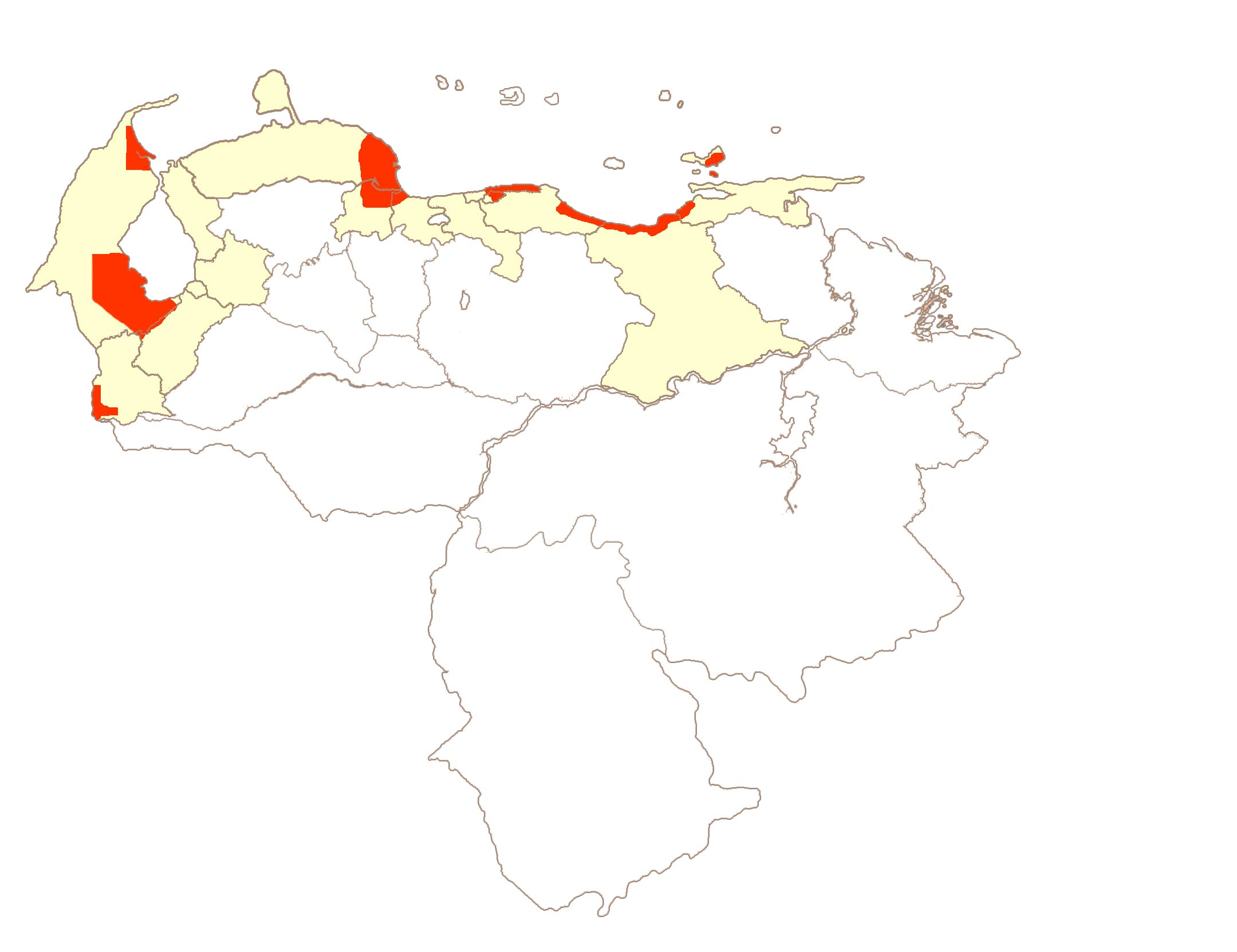 Mapa realizado por el usuario Venex en el cual se muestran las zonas afectadas por el desastre en rojo y los estados afectados en un color claro. Mapa hecho según el informe del desastre.